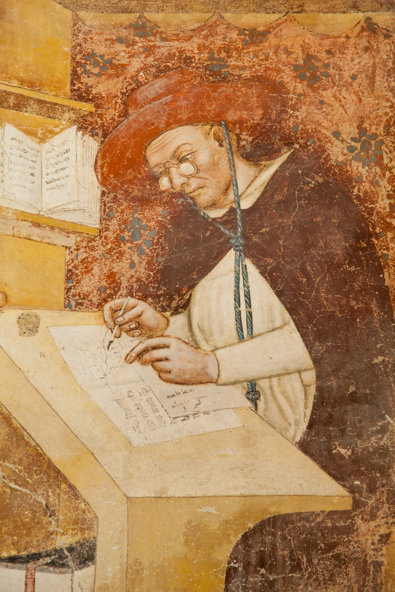 Cette image est utilisée en couverture de : Louis-Jacques Bataillon, Gilbert Dahan et Pierre-Marie Gy (dir.), Hugues de Saint-Cher († 1263), bibliste et théologien, Paris, Centre d’études du Saulchoir, Actes du colloque 13-15 mars 2000, Brepols, coll. « Bibliothèque d’histoire culturelle du Moyen Âge », n°1, Turnhout, 2004, 524 p., ISBN : 2-503-51721-8 comme on peut le voir ici. Cette image est commentée au dernier paragraphe de cette recension qui l'affirme être un portrait d'Hugues de Saint-Cher.